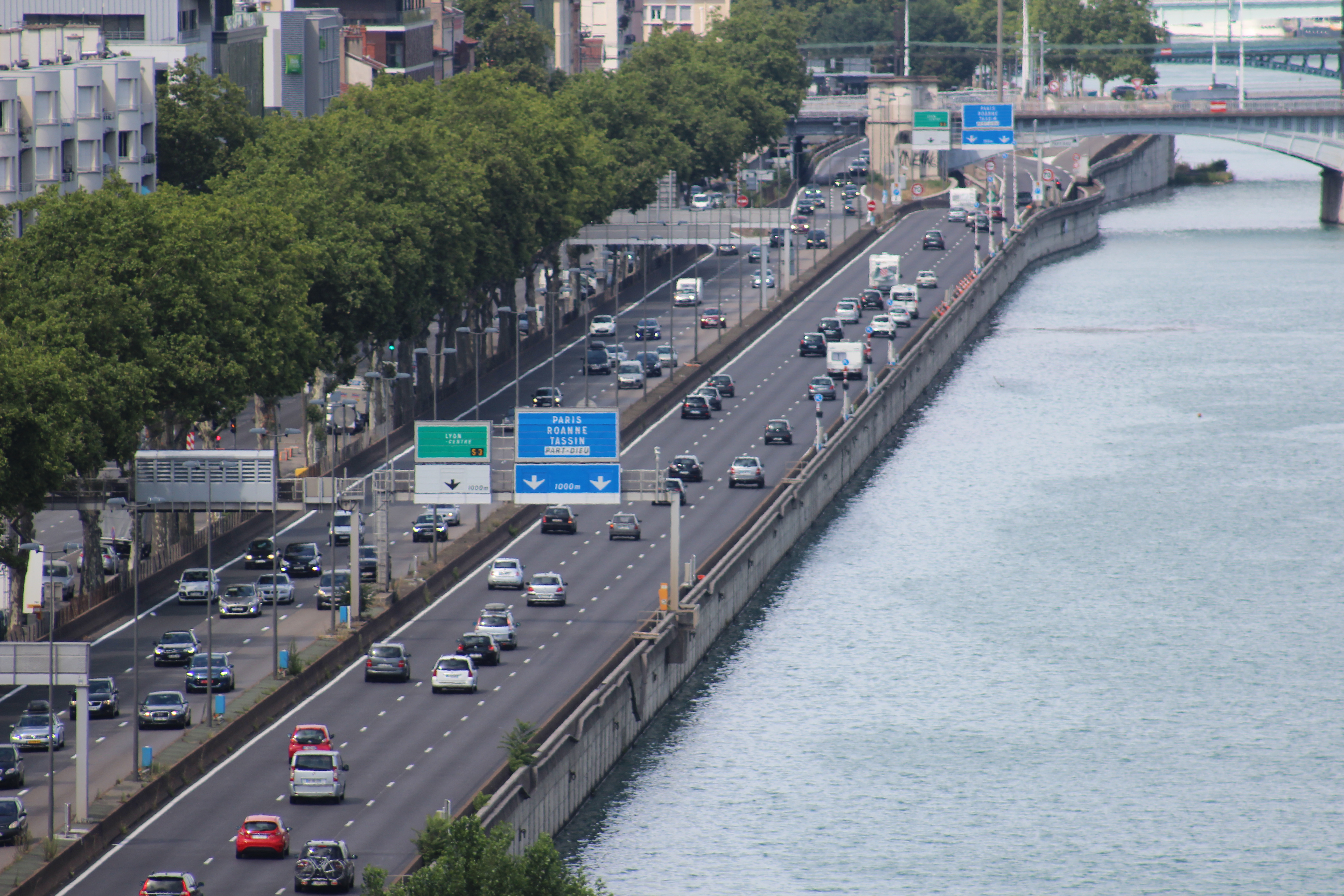 L'autoroute A7 le long du Rhône à Lyon.